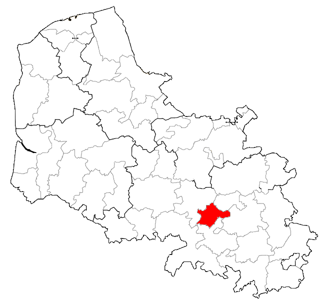 Localisation de la CCVG dans le Pas-de-Calais.